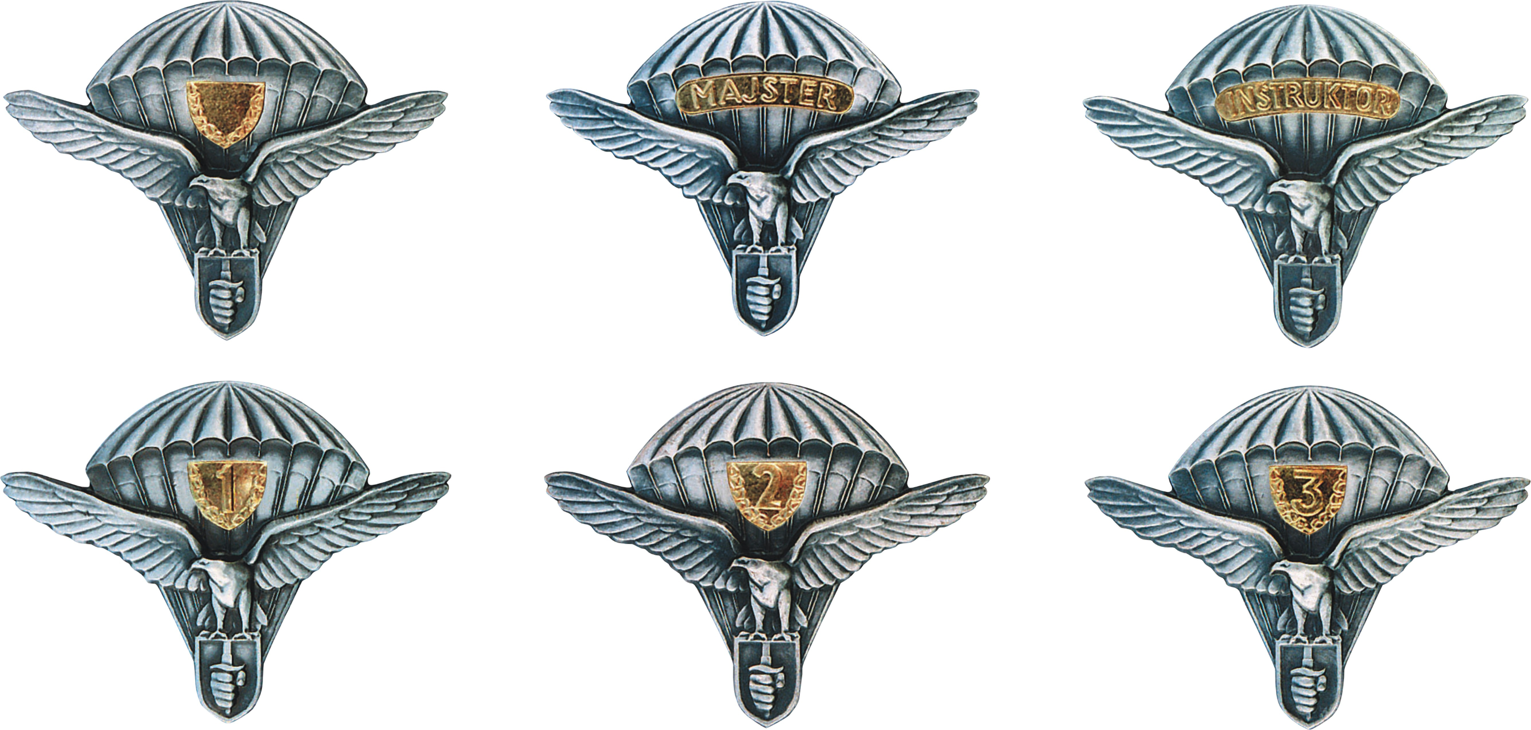 Odznaky výsadkárov Ozbrojených síl Slovenskej republiky "Majster", "Inštruktor", 1., 2. a 3. triedy a bez triedy